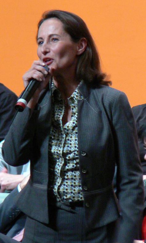 Nantes Cité des congrès - meeting de Ségolène Royal